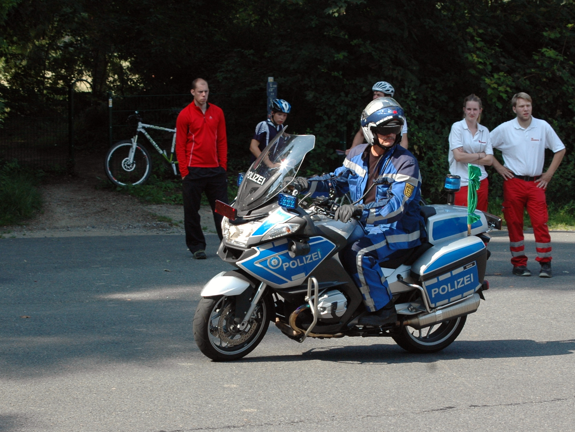 Heidelberg